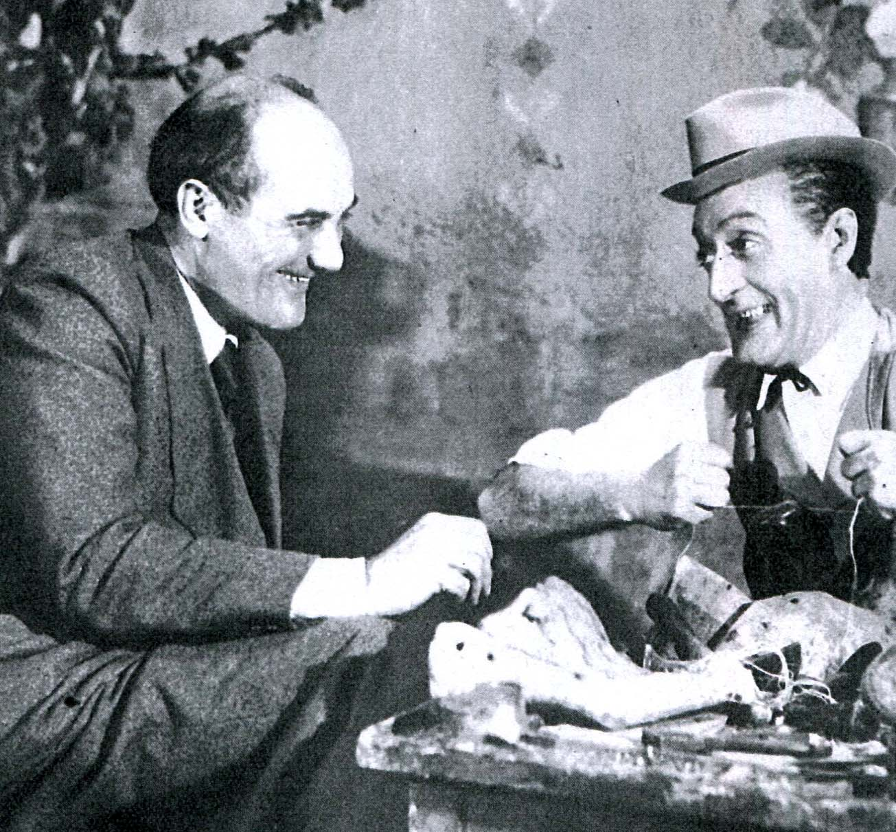 San Giovanni decollato film italiano, regia Amleto Palermi(1886-1941)1940, prod Capitani, Roma, 1940.- foto del set cinematografico- ottobre 1940 - con (a sin.) il regista Amleto Palermi e Totò